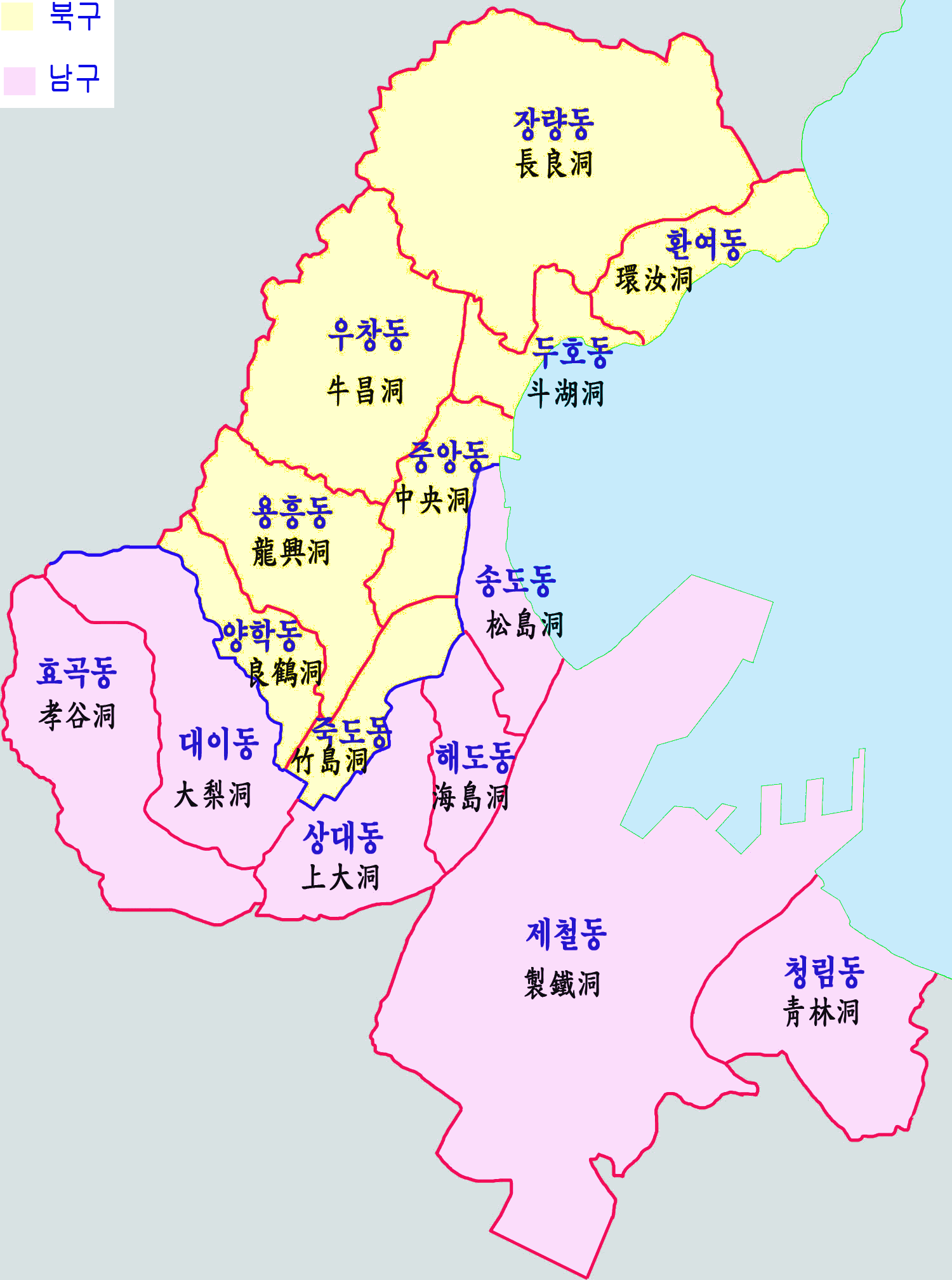 포항시내동구역